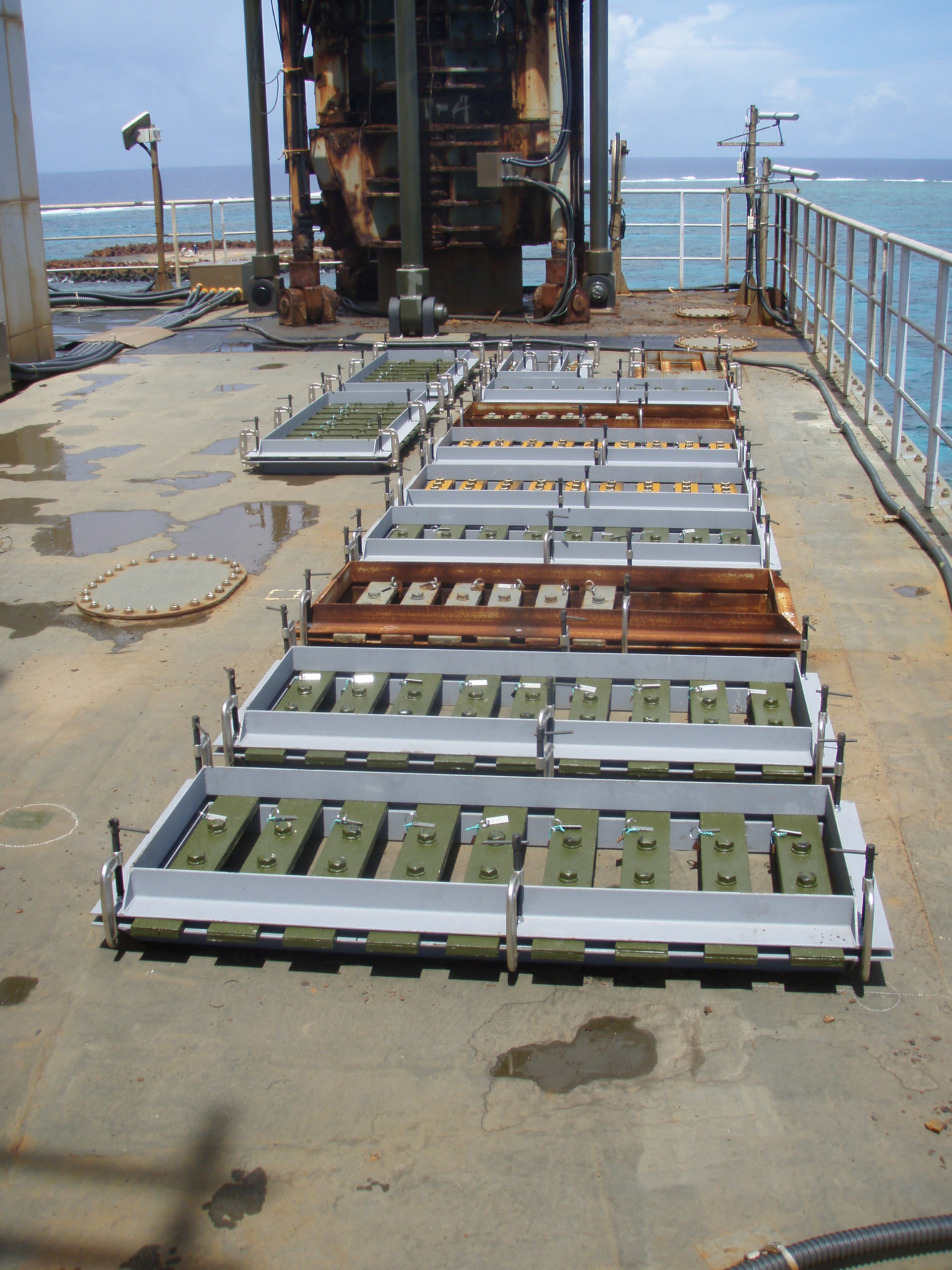 沖ノ鳥島にて、金属、塗装、コンクリートなどの耐久性を試験している様子。